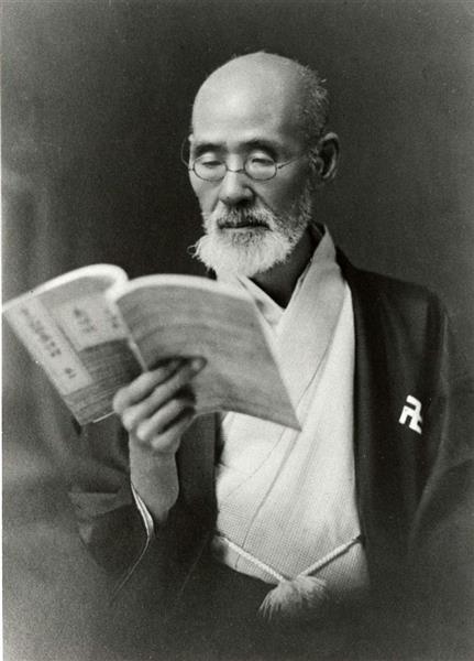 Japanese lexicographer Ōtsuki Fumihiko